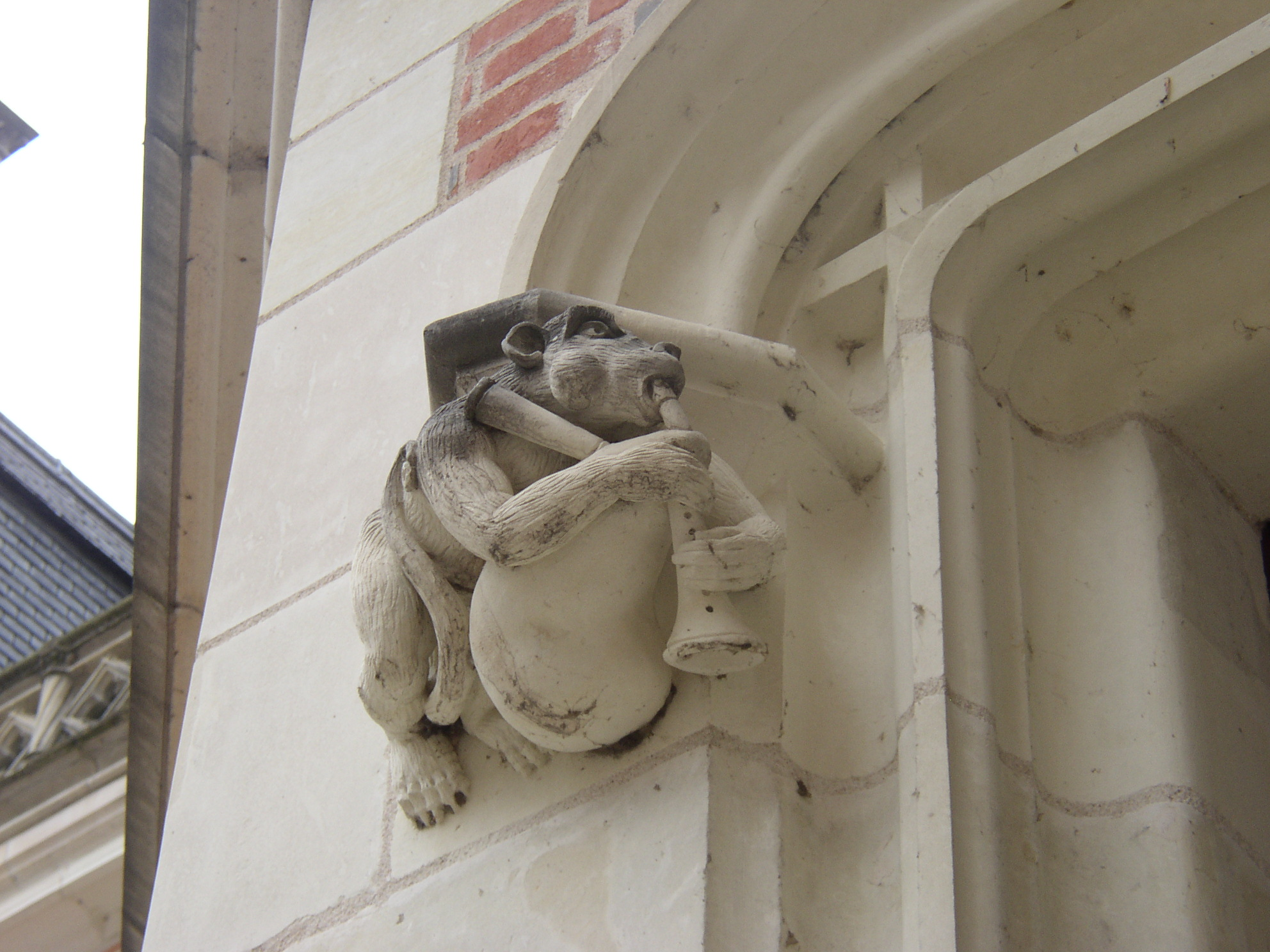 Présent sur la façade de l'aile Louis XII dans la cour du château .